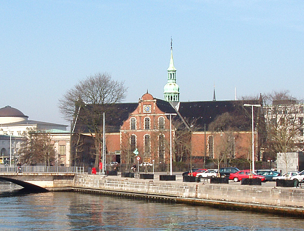 Holmen kirke, København, Denmark